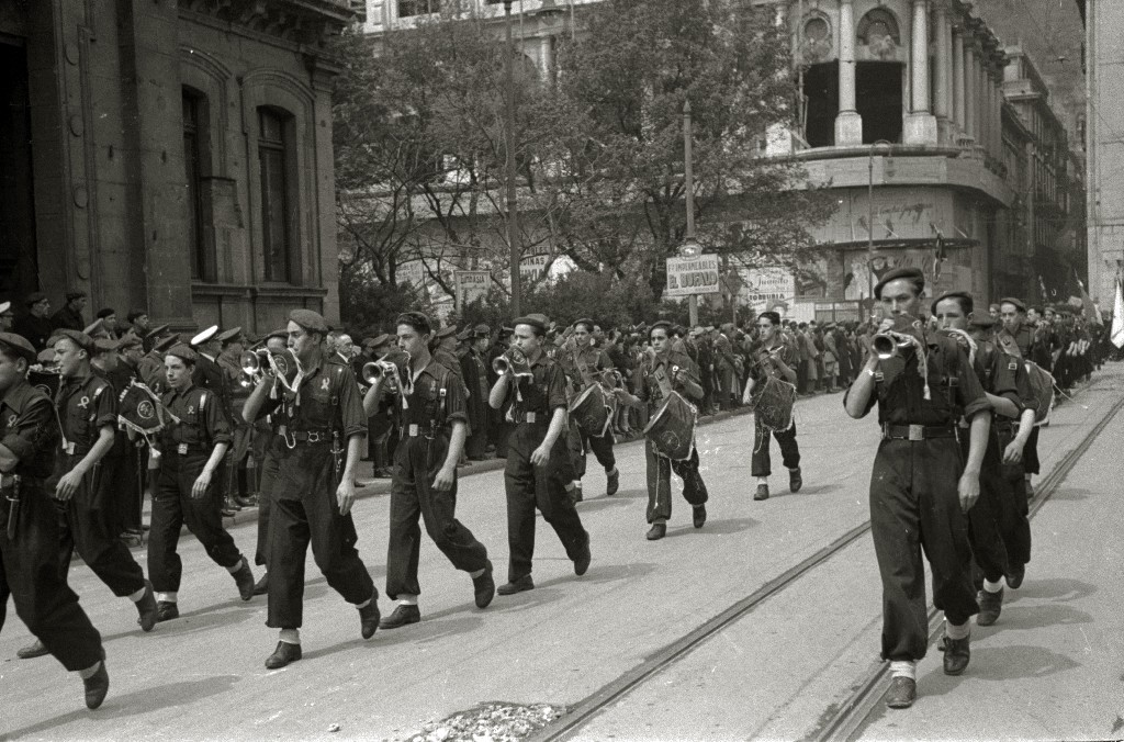 Título original: Acto en homenaje a José Antonio Primo de Rivera (7/12) Localización: San Sebastián (Guipúzcoa)